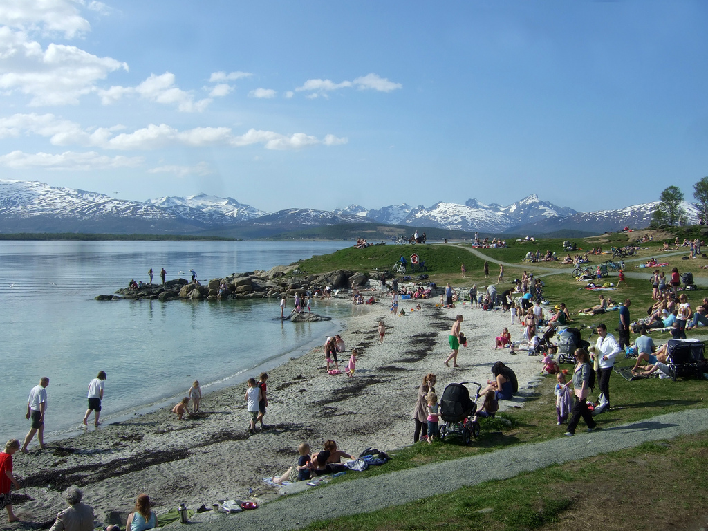 Telegrafbukta Tromsø